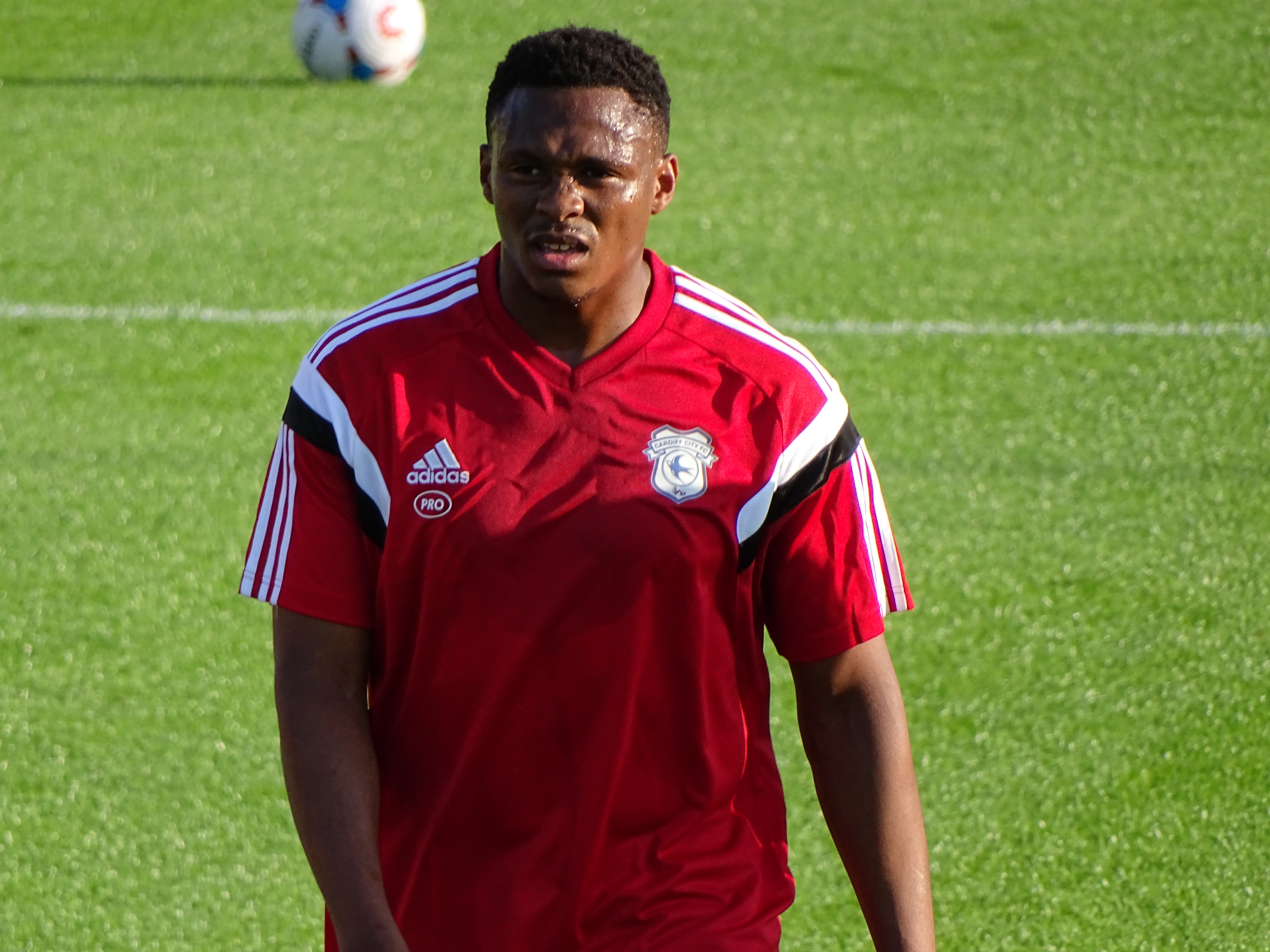 Kagisho Dikgacoi